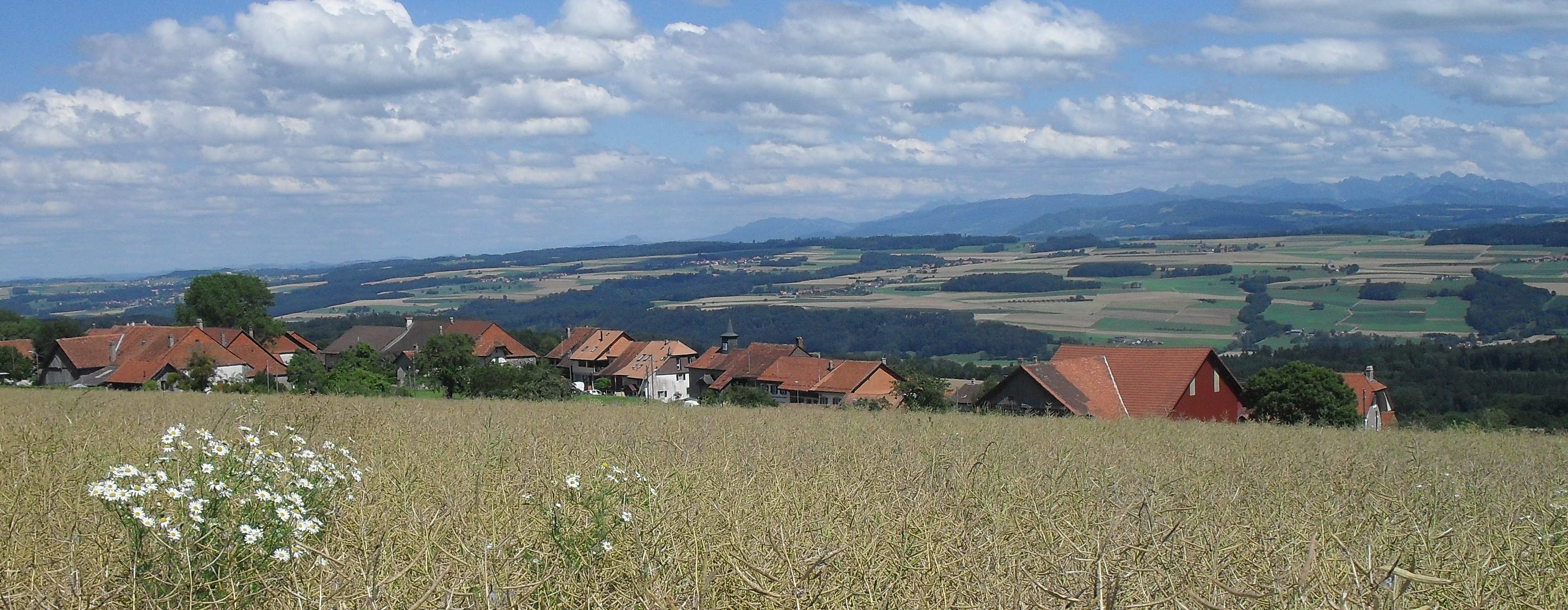 Vue de Villars-le-Comte